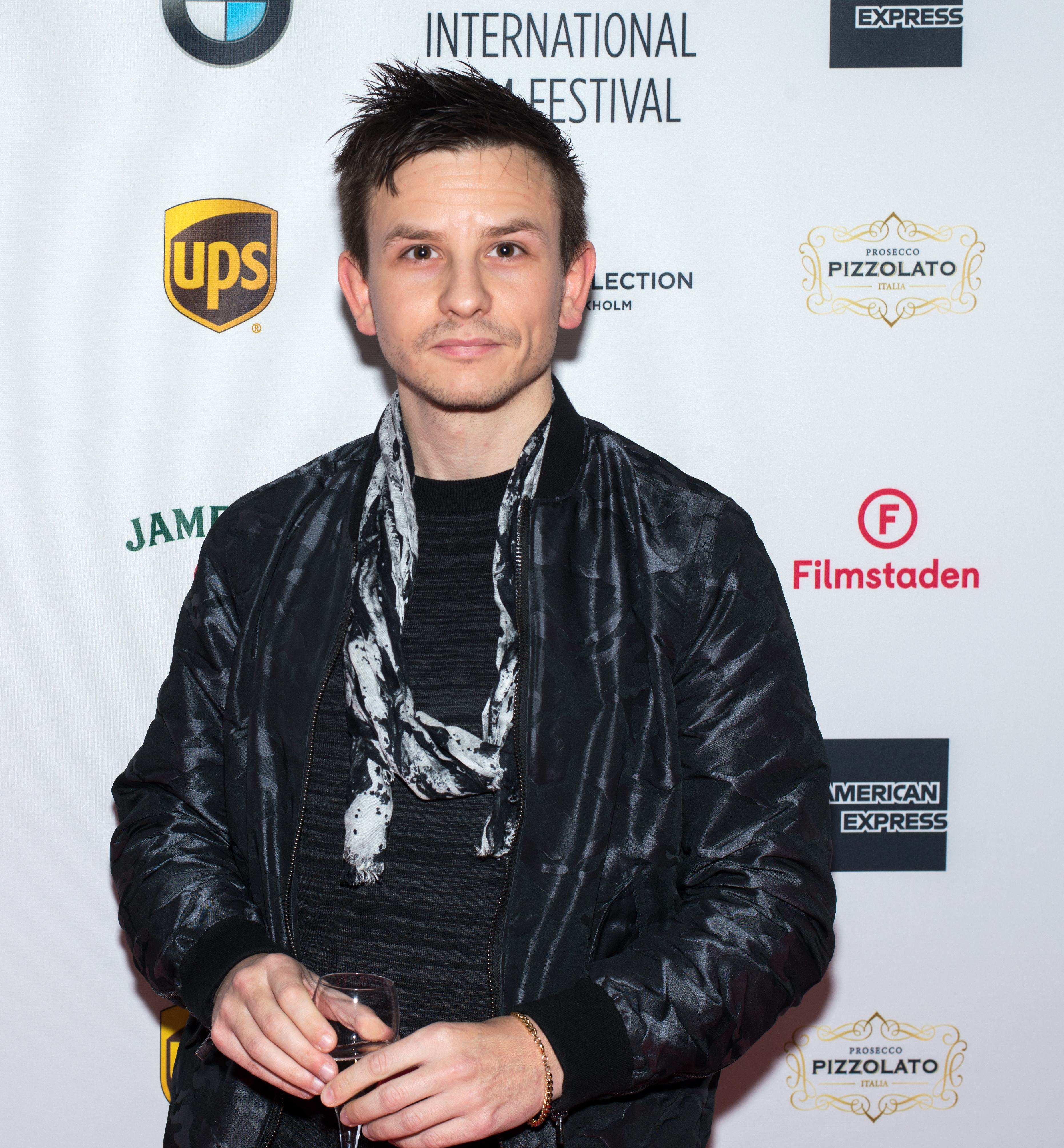 Daniel Bramme inför prisutdelningen på Stockholms internationella filmfestival den 16 november 2018.